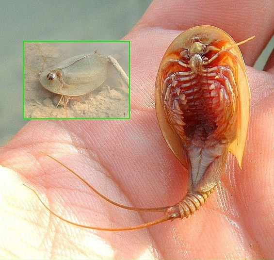 Triops cancriformis en una charca de Los Monegros (Zaragoza)